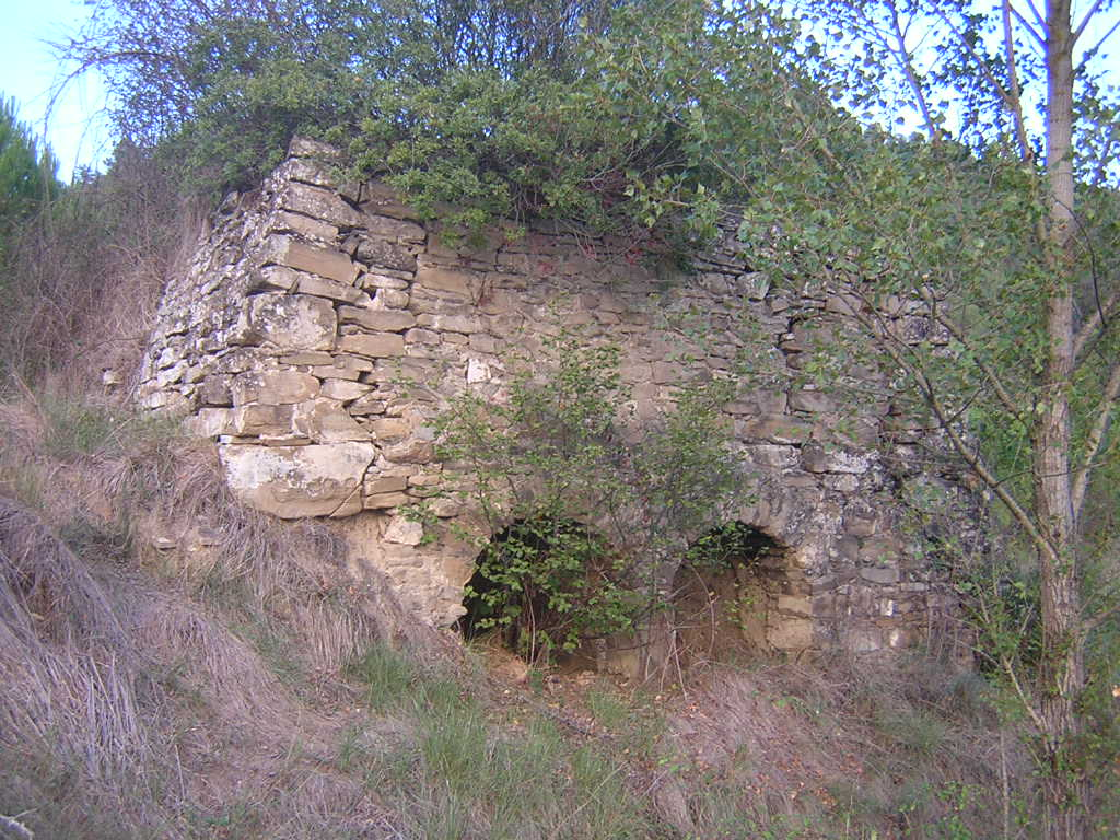 El Forn de la Coma (Monistrol de Calders, Moianès)